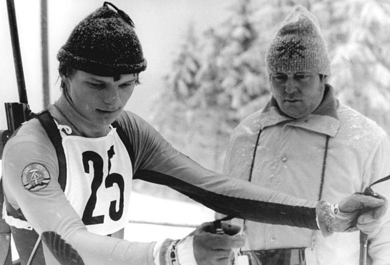 Jens Steinigen ADN-ZB Schaar 22.2.85 Schweiz: WM-Titel für Steinigen- Bei den Junioren-Weltmeisterschaften im Biathlon in Egg errang der Zinnwalder Jens Steinigen (Foto von den DDR-Meisterschaften im Januar 1984 in Oberhof) den Titel über 15 km überlegen vor dem Oberhofer Maik Dietz.